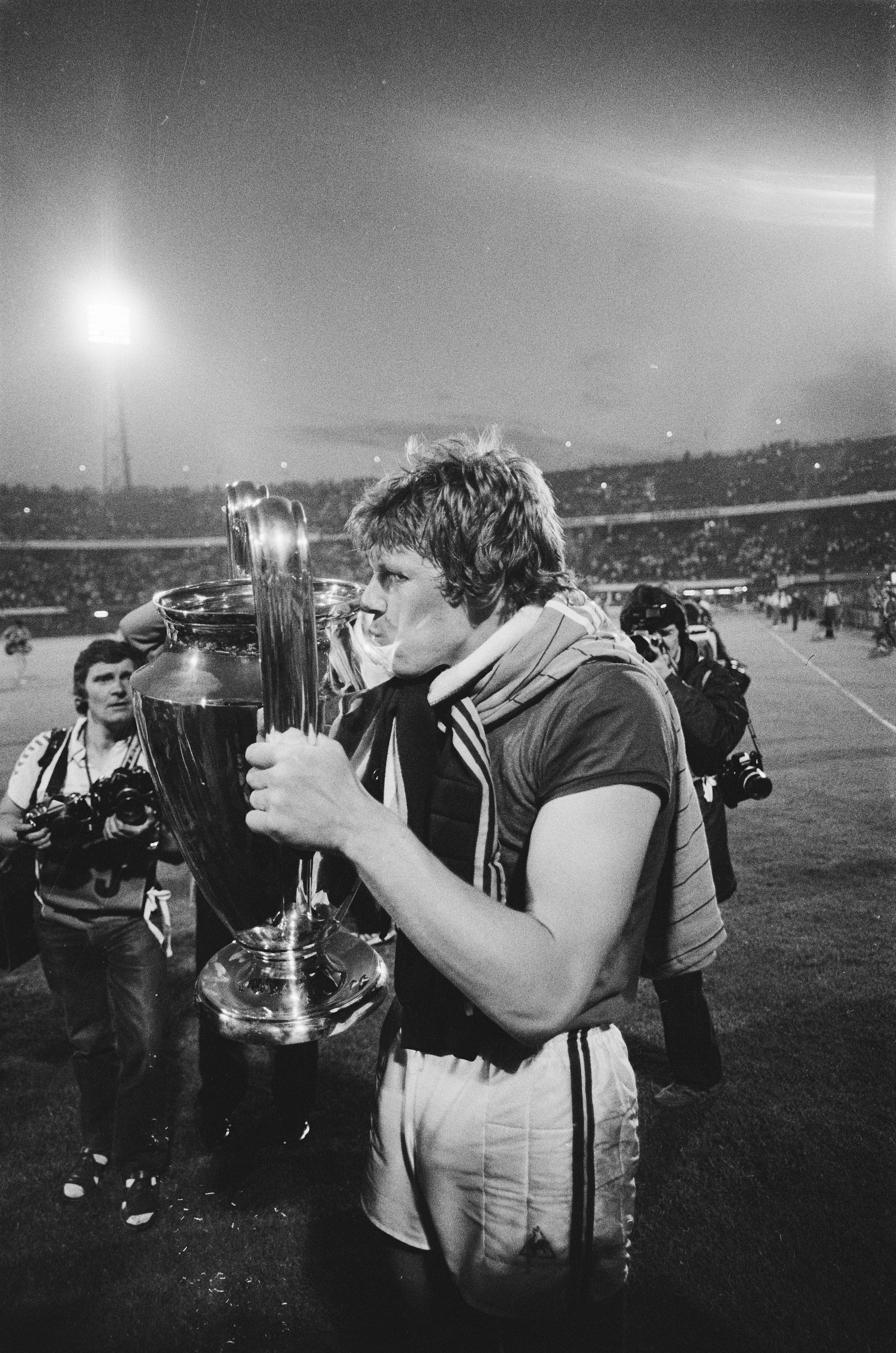 Collectie / Archief : Fotocollectie Anefo Reportage / Serie : [ onbekend ] Beschrijving : FC Bayern Munchen tegen Aston Villa 0-1 Europa Cup I blijde Aston Villa spelers met de Cup Datum : 26 mei 1982 Trefwoorden : sport, voetbal Persoonsnaam : Aston Villa, CUP, FC Bayern Munchen Fotograaf : Antonisse, Marcel / Anefo Auteursrechthebbende : Nationaal Archief Materiaalsoort : Negatief (zwart/wit) Nummer archiefinventaris : bekijk toegang 2.24.01.05 Bestanddeelnummer : 932-1810